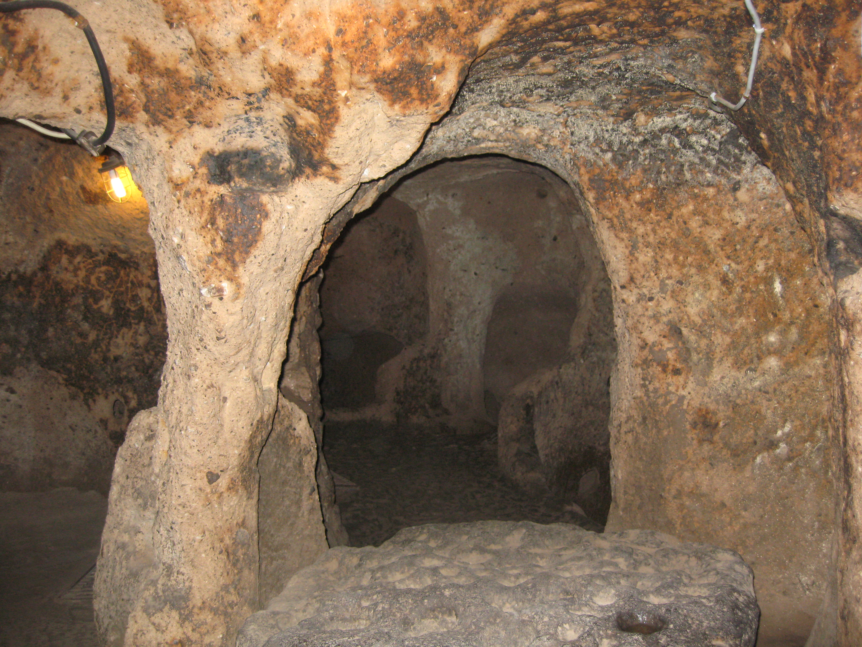 Kaymakli